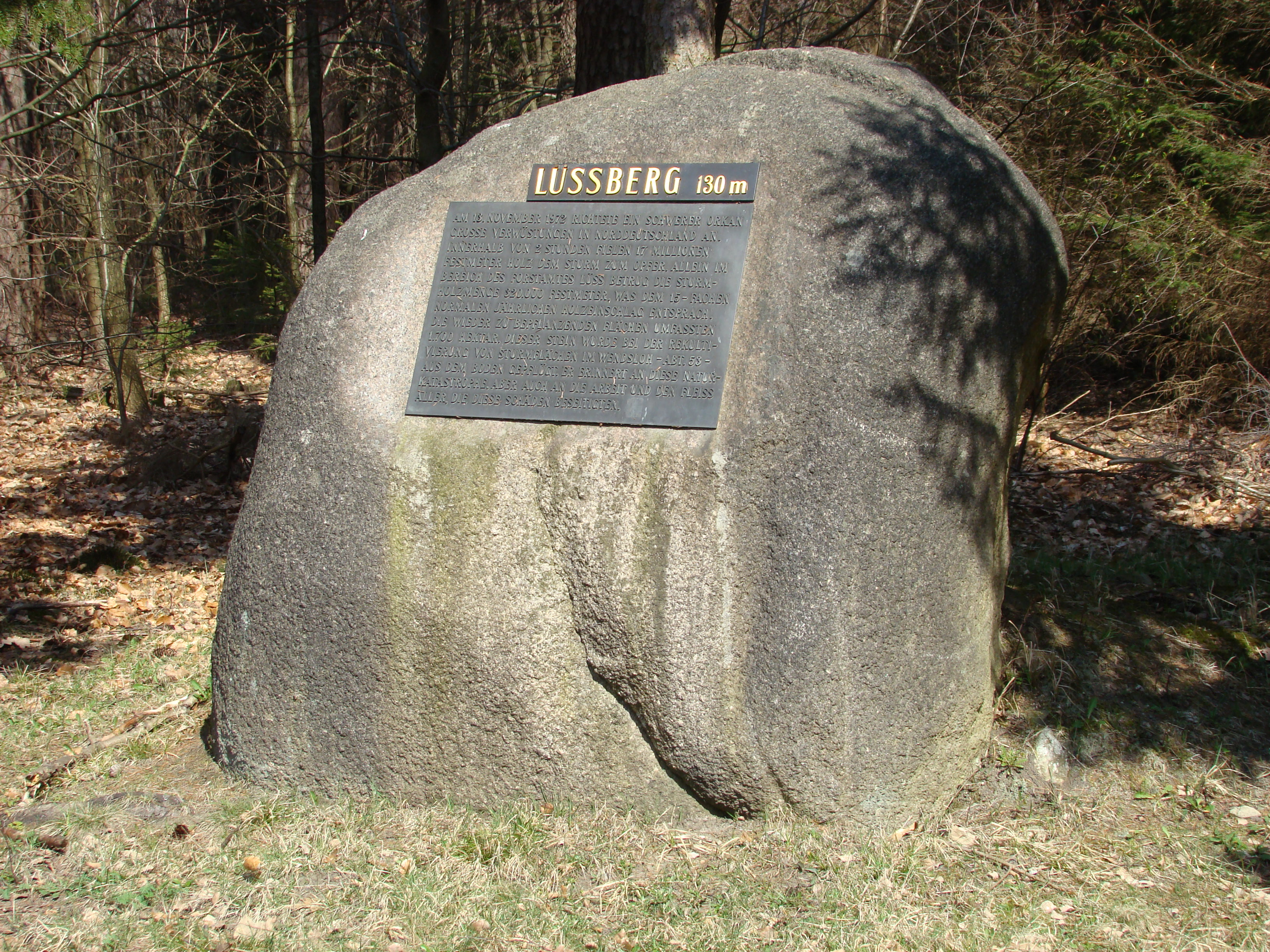 Gedenkstein auf dem Lüßberg im Lüßwald zur Sturmkatastrophe 1972, Niedersachsen